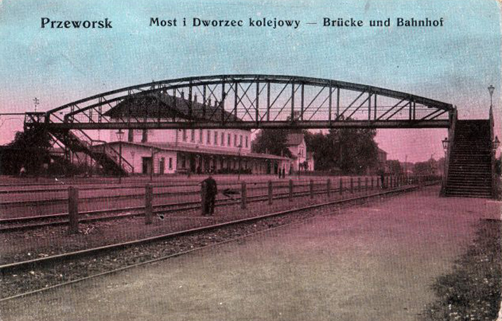 Dworzec Główny w Przeworsku - fot. archiwalna